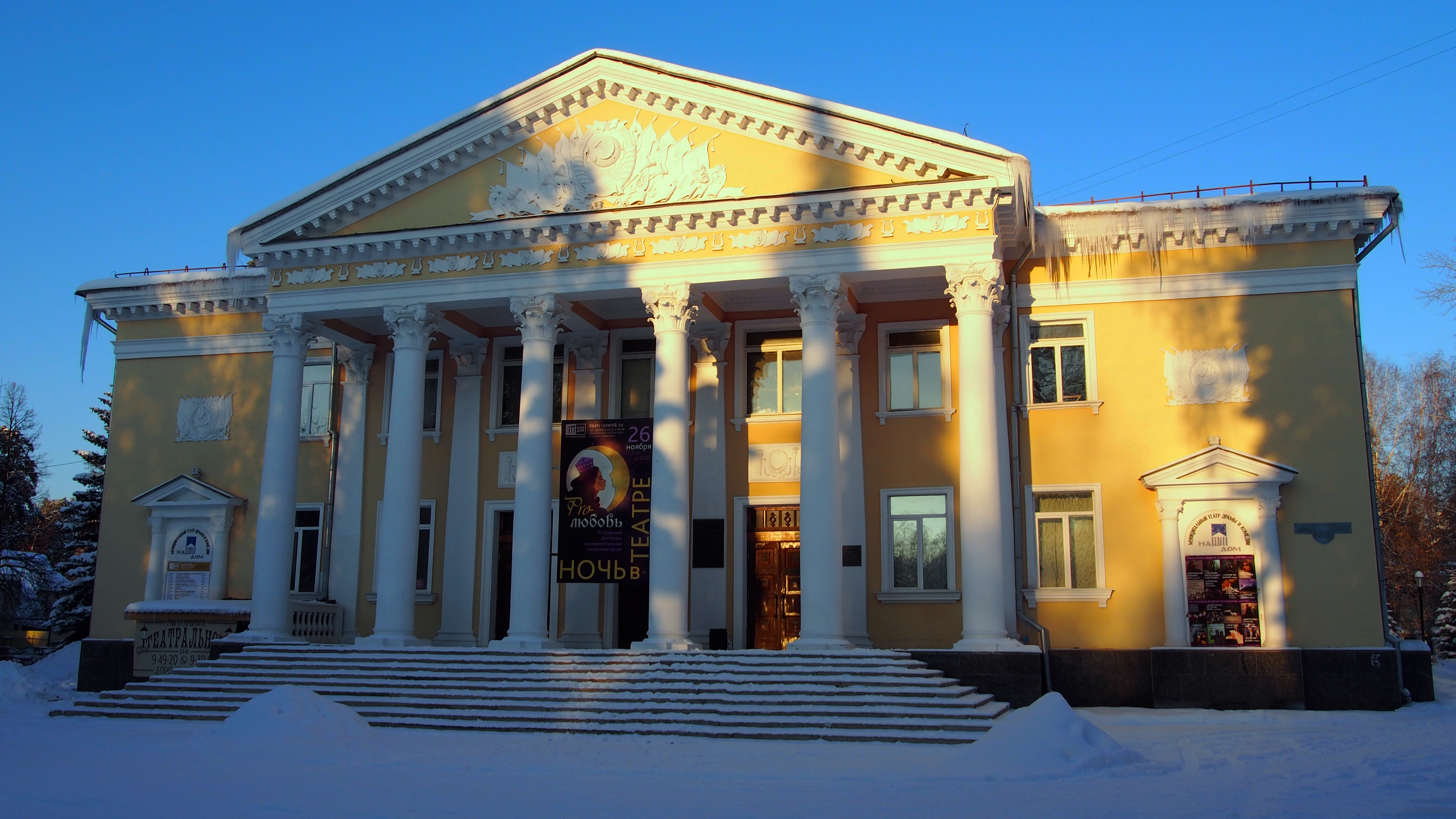 театр "Наш дом"